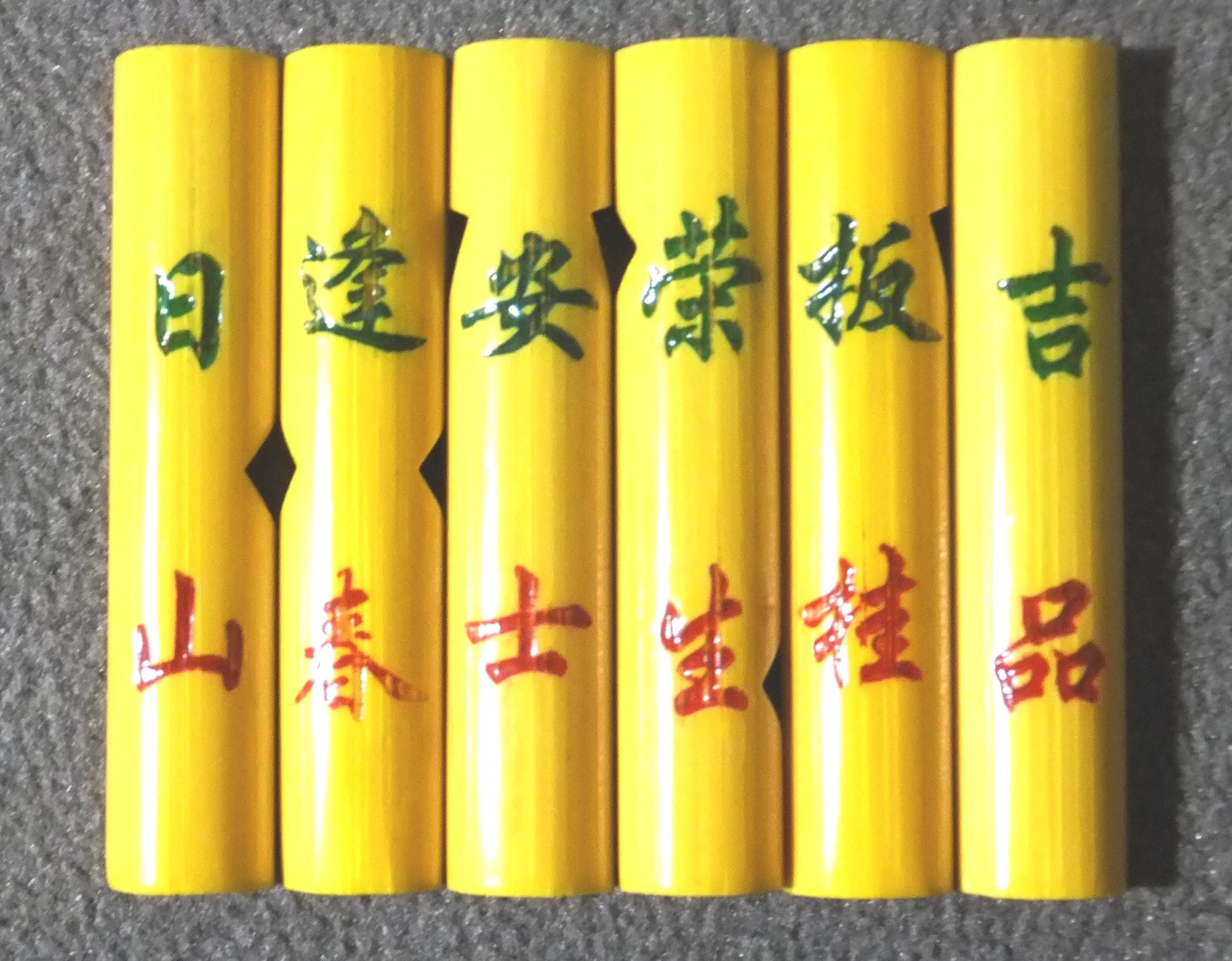 六名的賭具